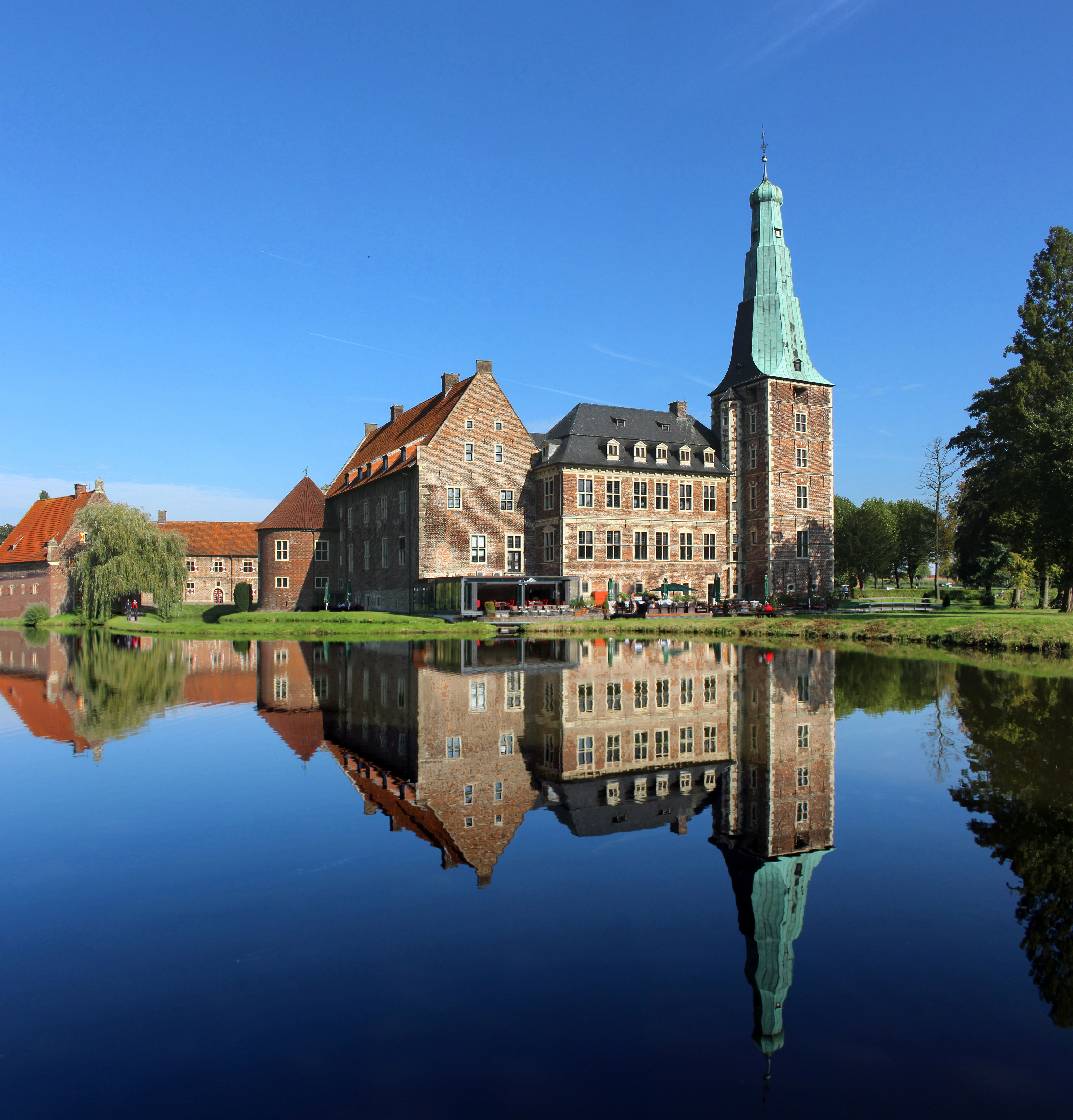 Wasserschloss Raesfeld - Raesfeld, Nordrhein-Westfalen, Deutschland